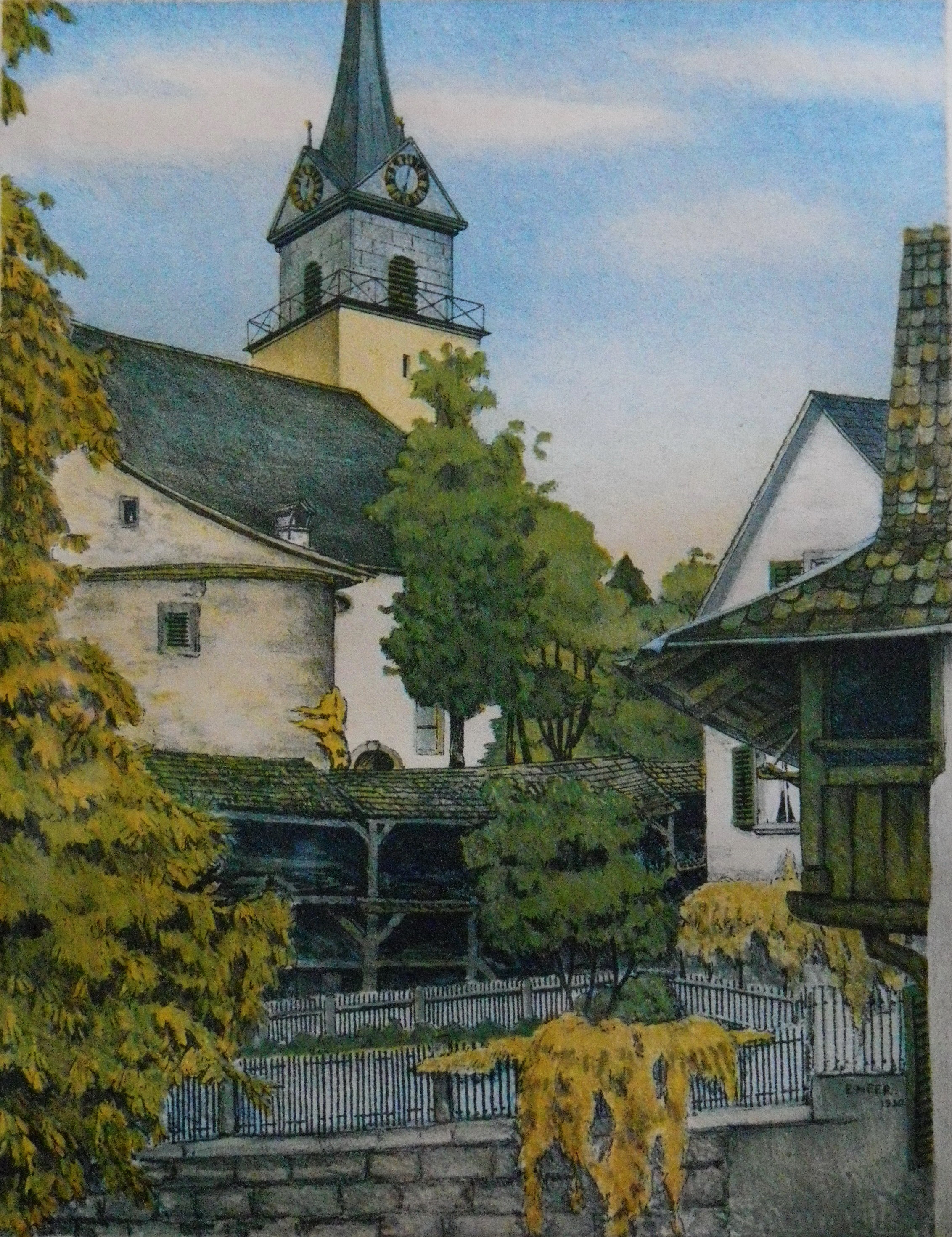 Die Dorfkirche St. Moritz in Hallau aus südwestlicher Richtung, Lithografie von Erwin Heer, vermutlich nach einer alten Fotografie.